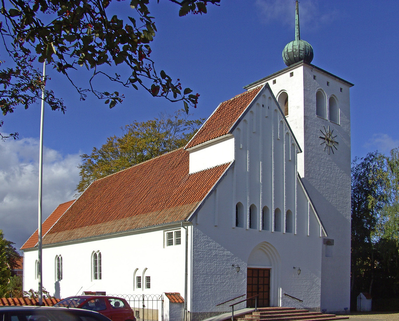 Ans kirke (Silkeborg kommune) fra sydvest